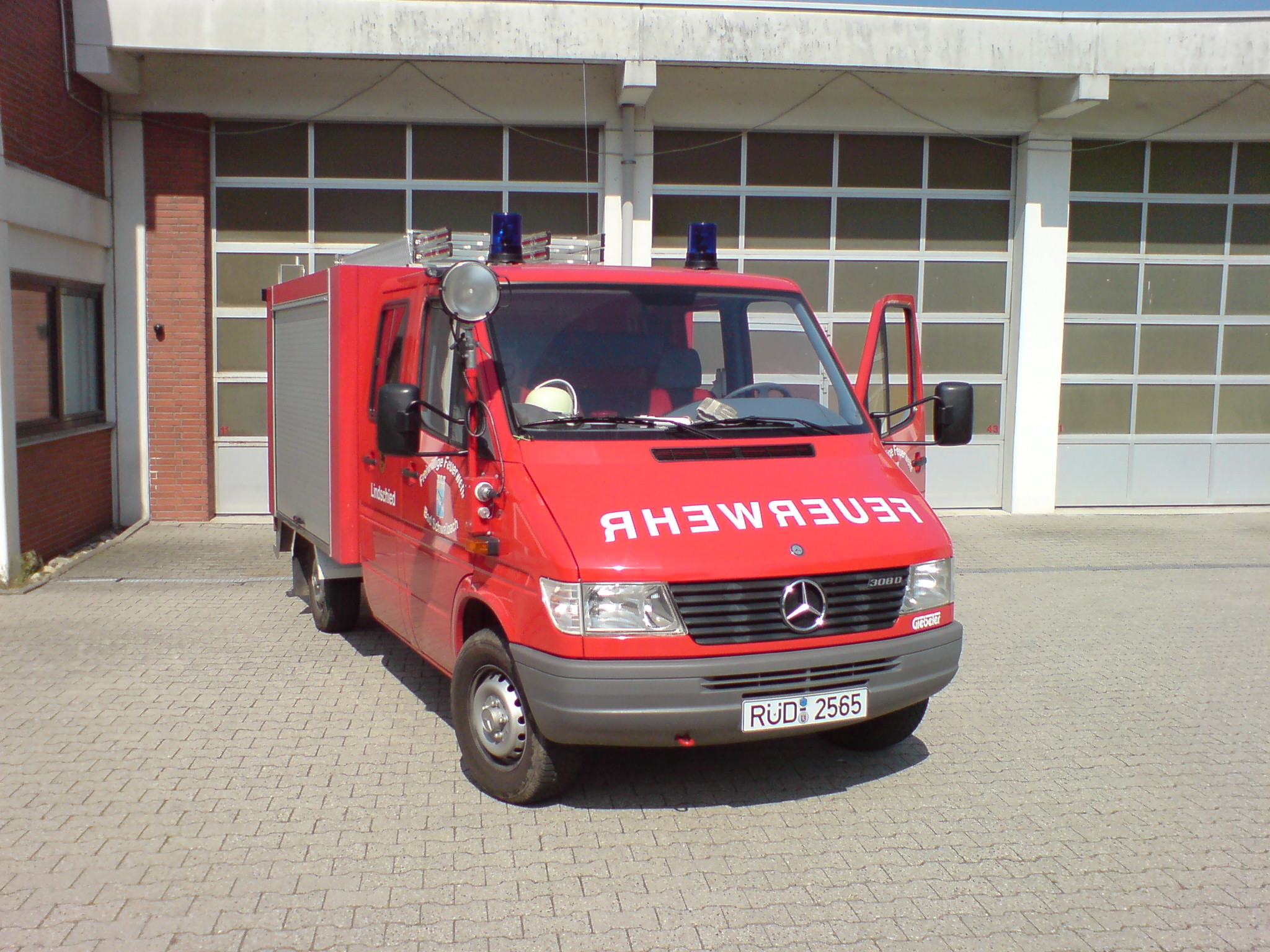 Lindschieds TSF